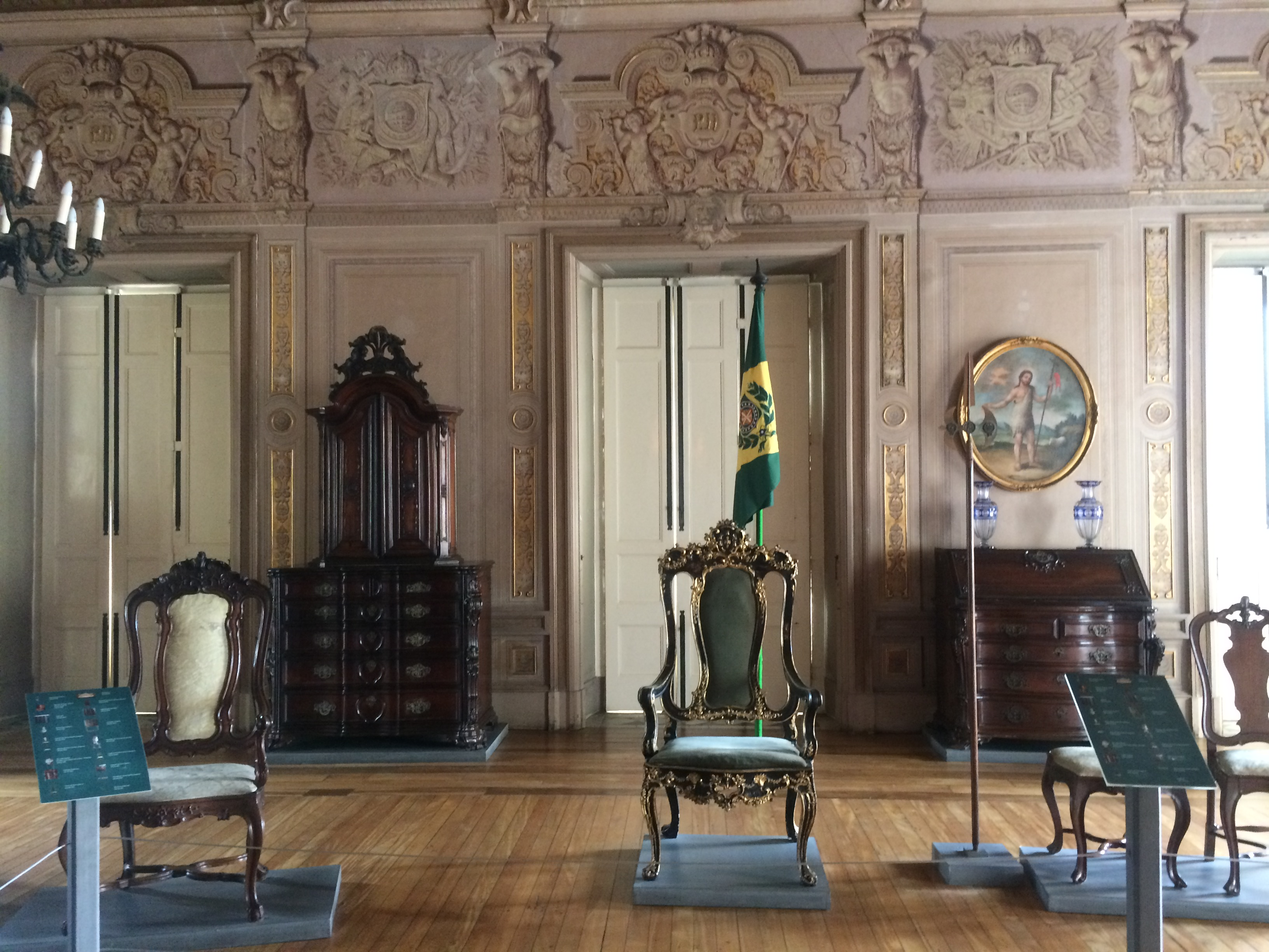 Acervo do Museu Nacional